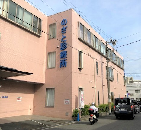 のざと診療所外観